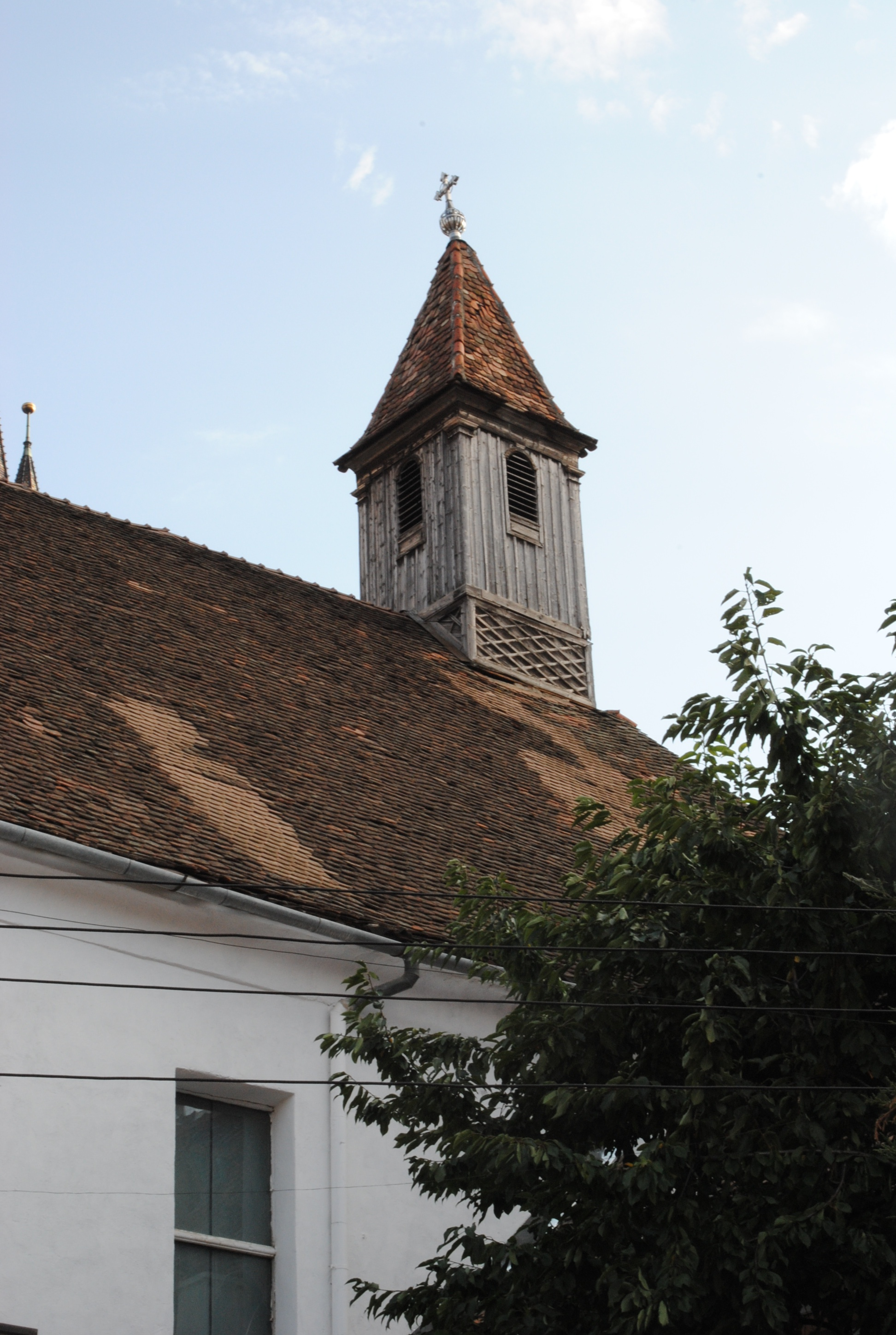 Biserica azilului, sec. XIII - XVIII 02